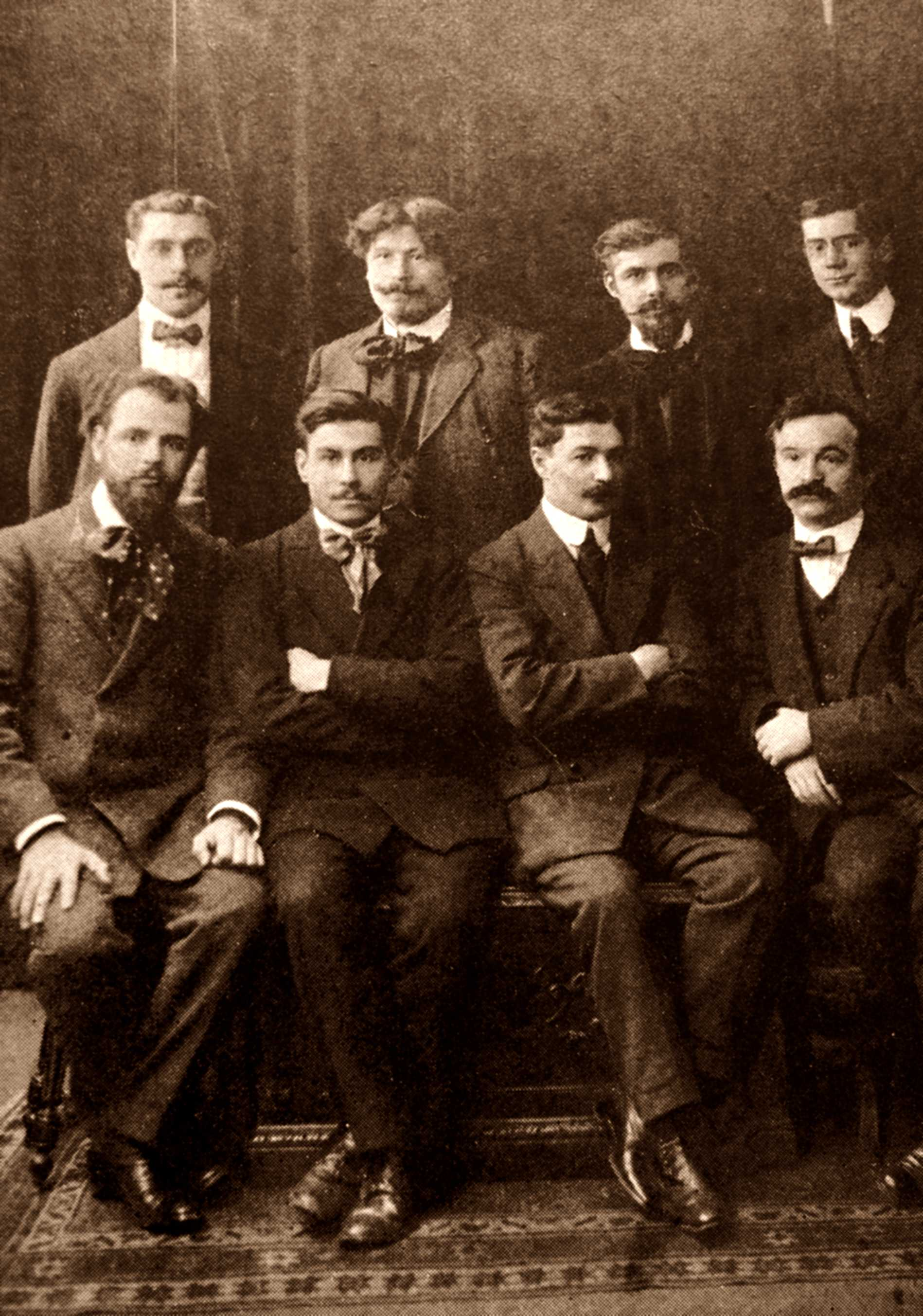 La Rédaction de La Bataille syndicaliste, publié entre le 27 avril 1911 et le 23 octobre 1915, journal syndicaliste révolutionnaire et libertaire.